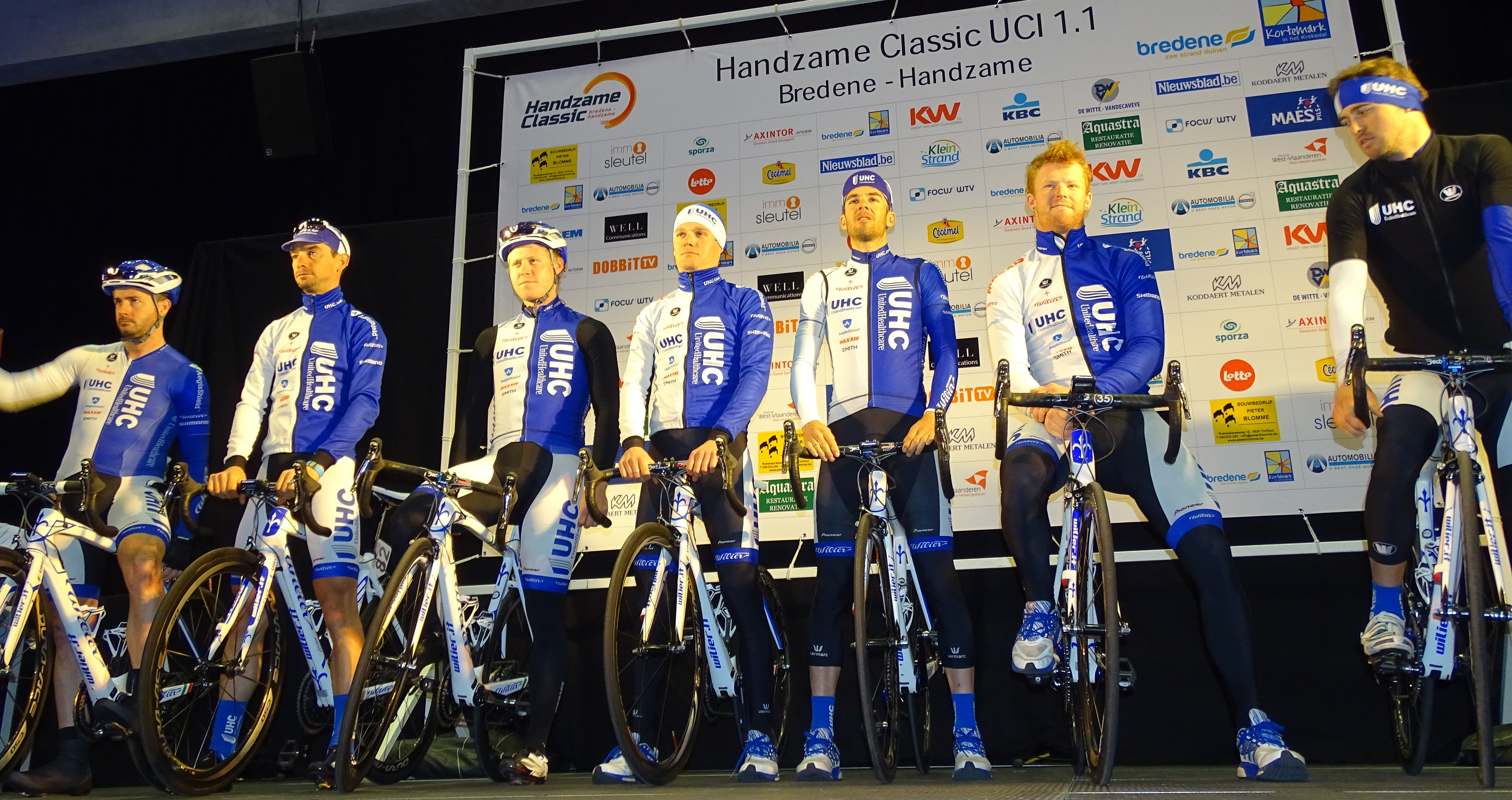 Reportage réalisé le vendredi 20 mars à l'occasion du départ de la Handzame Classic 2015 à Bredene, Belgique.